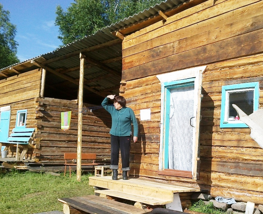 Новые летние домики в Улхансаг